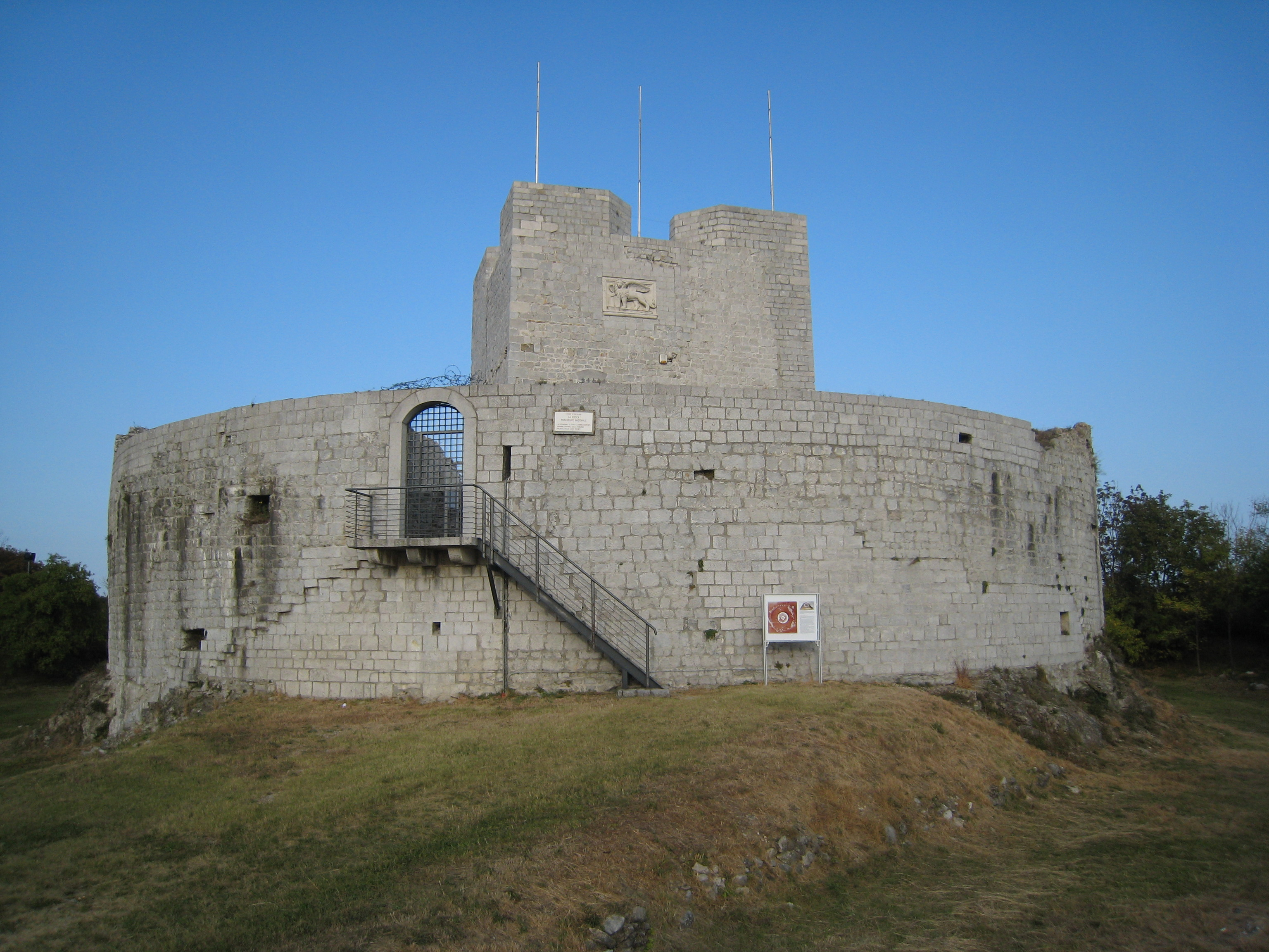 Monfalcone (GO) - La Rocca. 18-10-2008